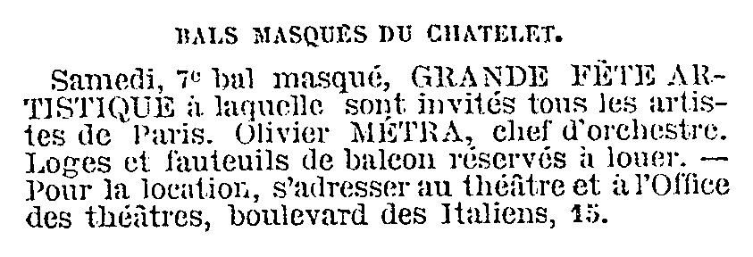 Annonce du 7ème bal masqué du Châtelet. Le Tintamarre, 31 janvier 1869, page 7, 1ère colonne.